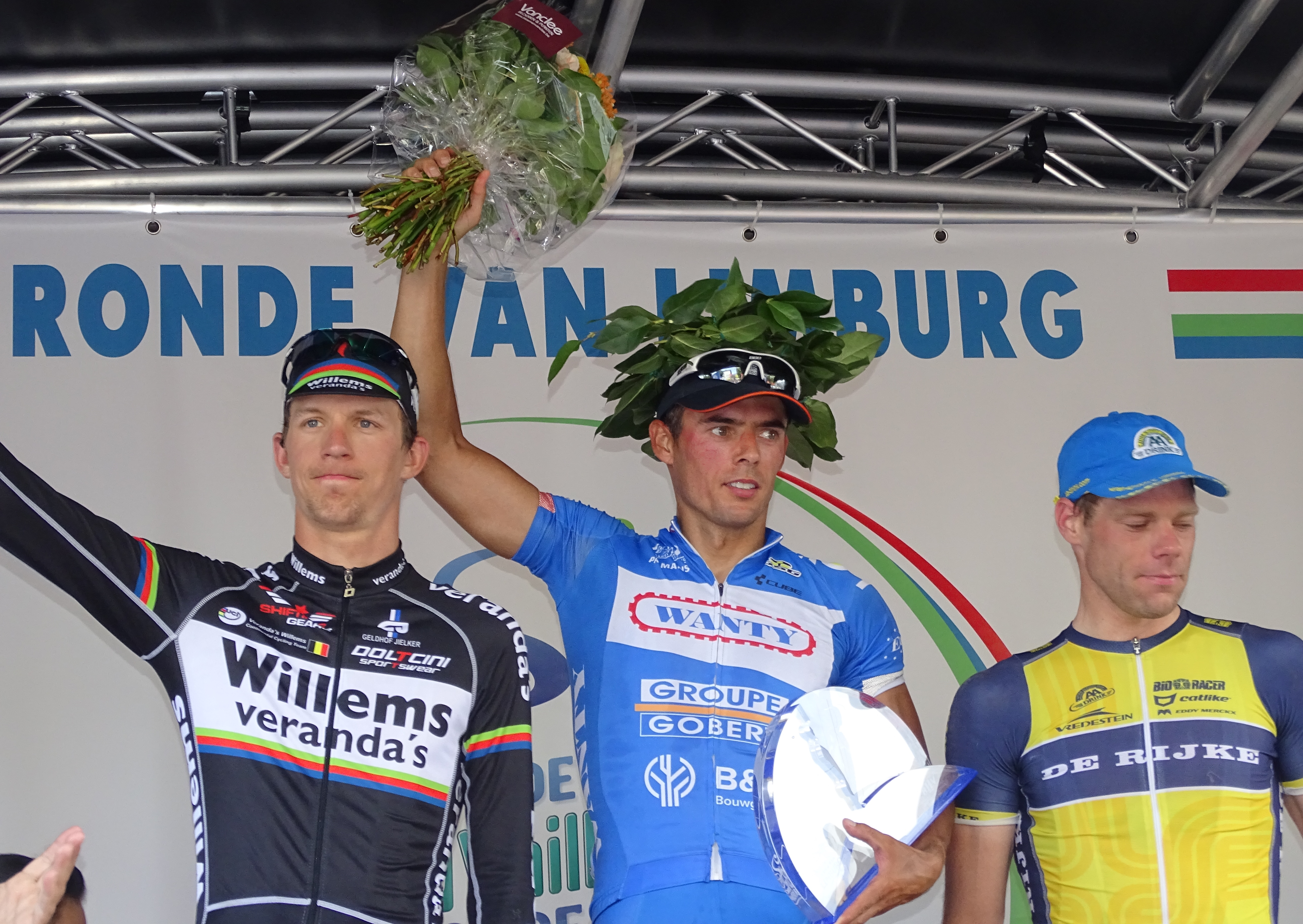 Reportage réalisé le dimanche 14 juin à l'occasion du départ et de l'arrivée du Tour du Limbourg 2015 à Tongres, Belgique.